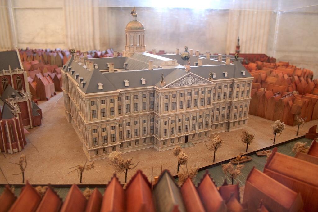 Maquette Paleis, zijde Nieuwezijds Voorburgwal. Geëxposeerd in het Paleis op de Dam; 2005. Foto: Erik Swierstra.